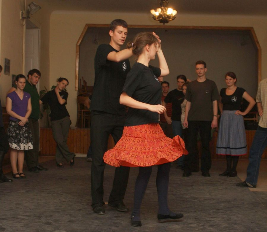 Az Ürmös Néptáncegyüttes próbál (Sopron, KISZÖV)